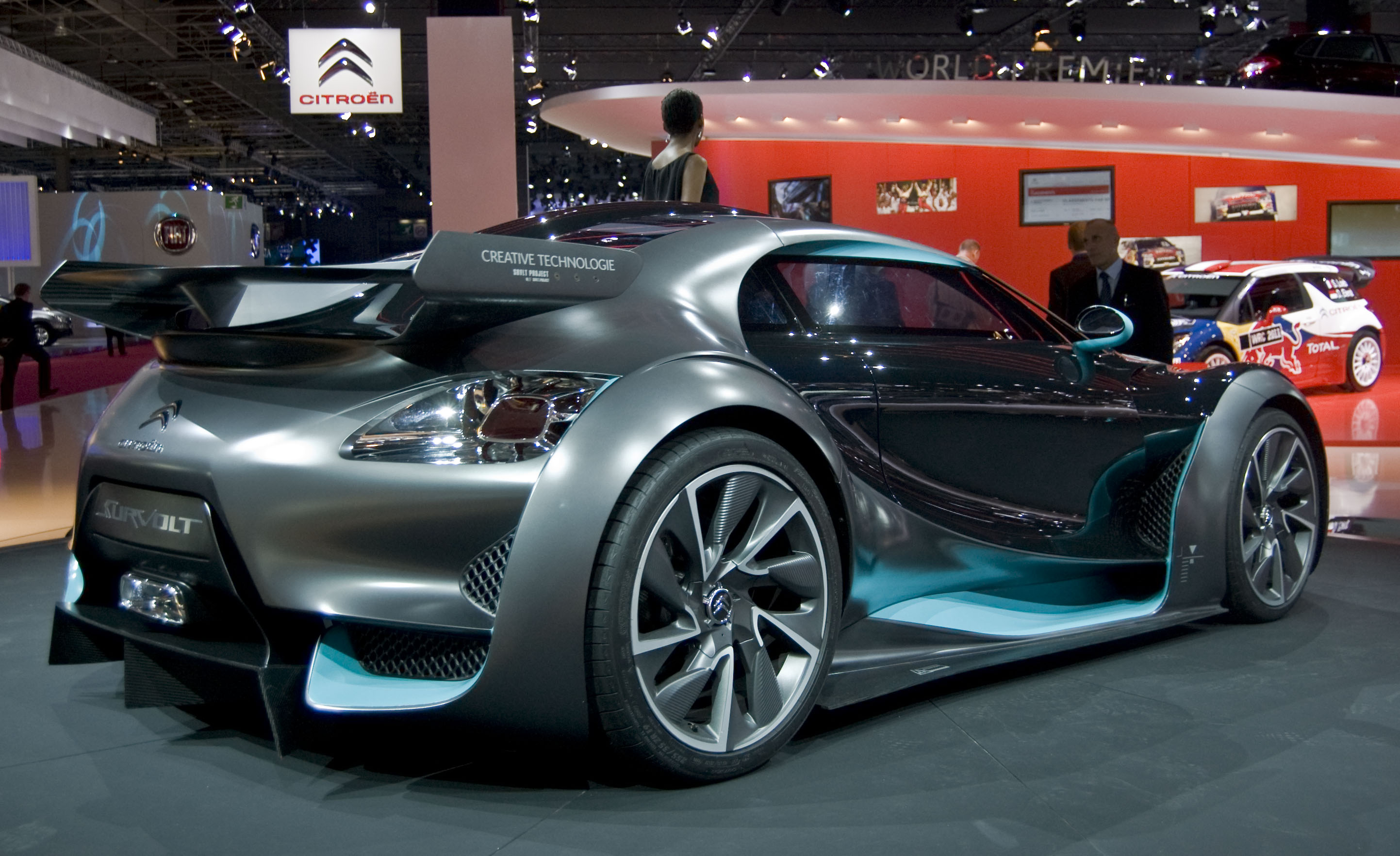 Citroën Survolt en el Salón de Paris 2010